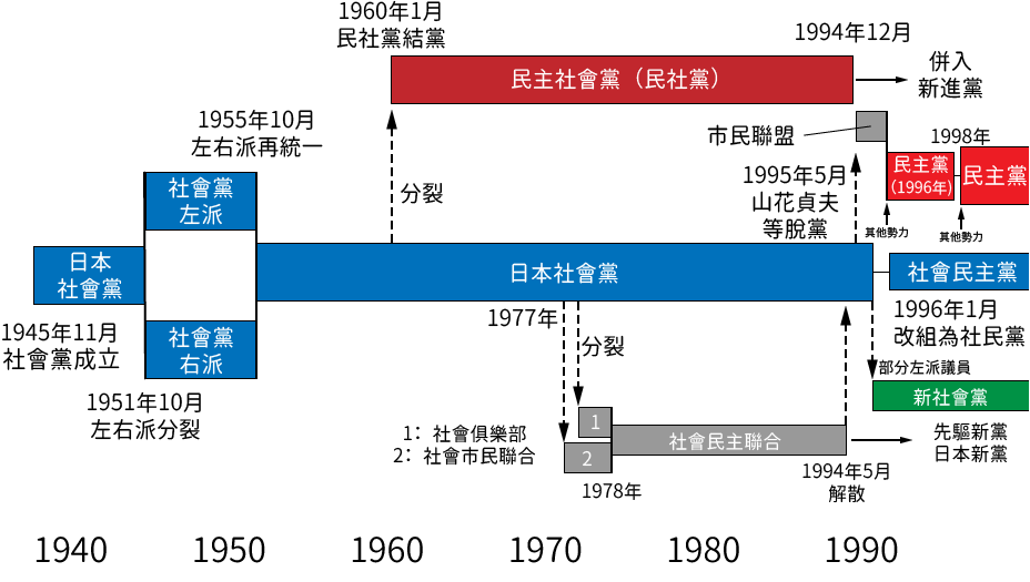 中文（台灣）: 日本社會黨歷史